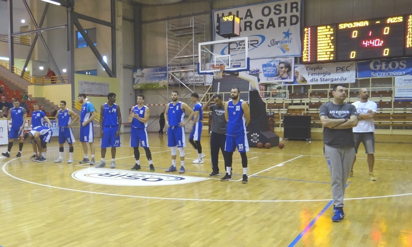 AZS Koszalin (22.09.2018)